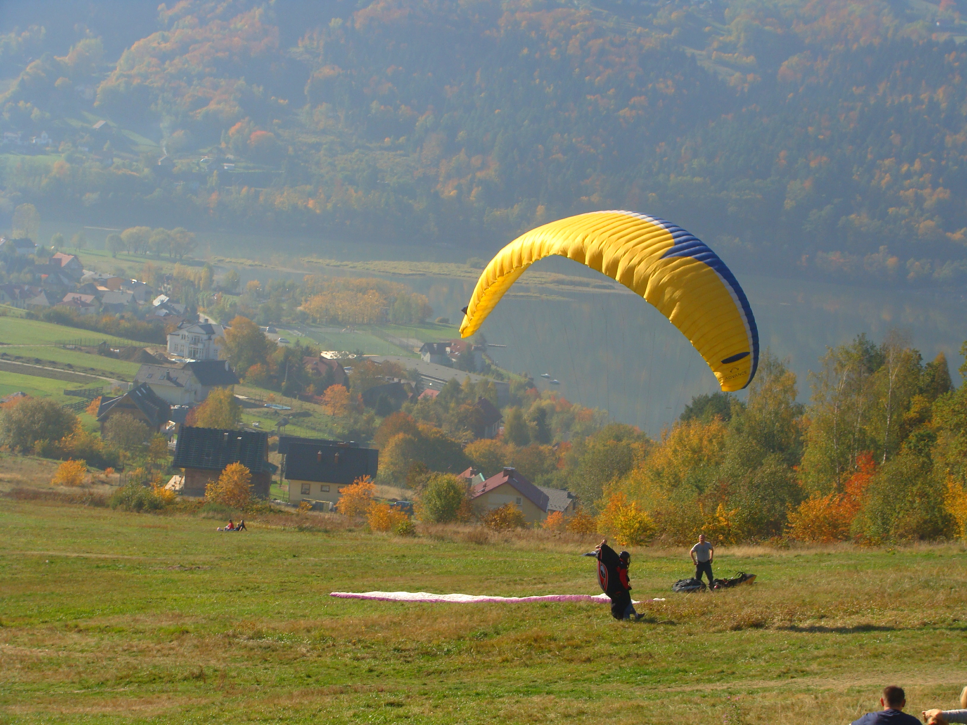 Paralotnia na zboczu góry Żar.